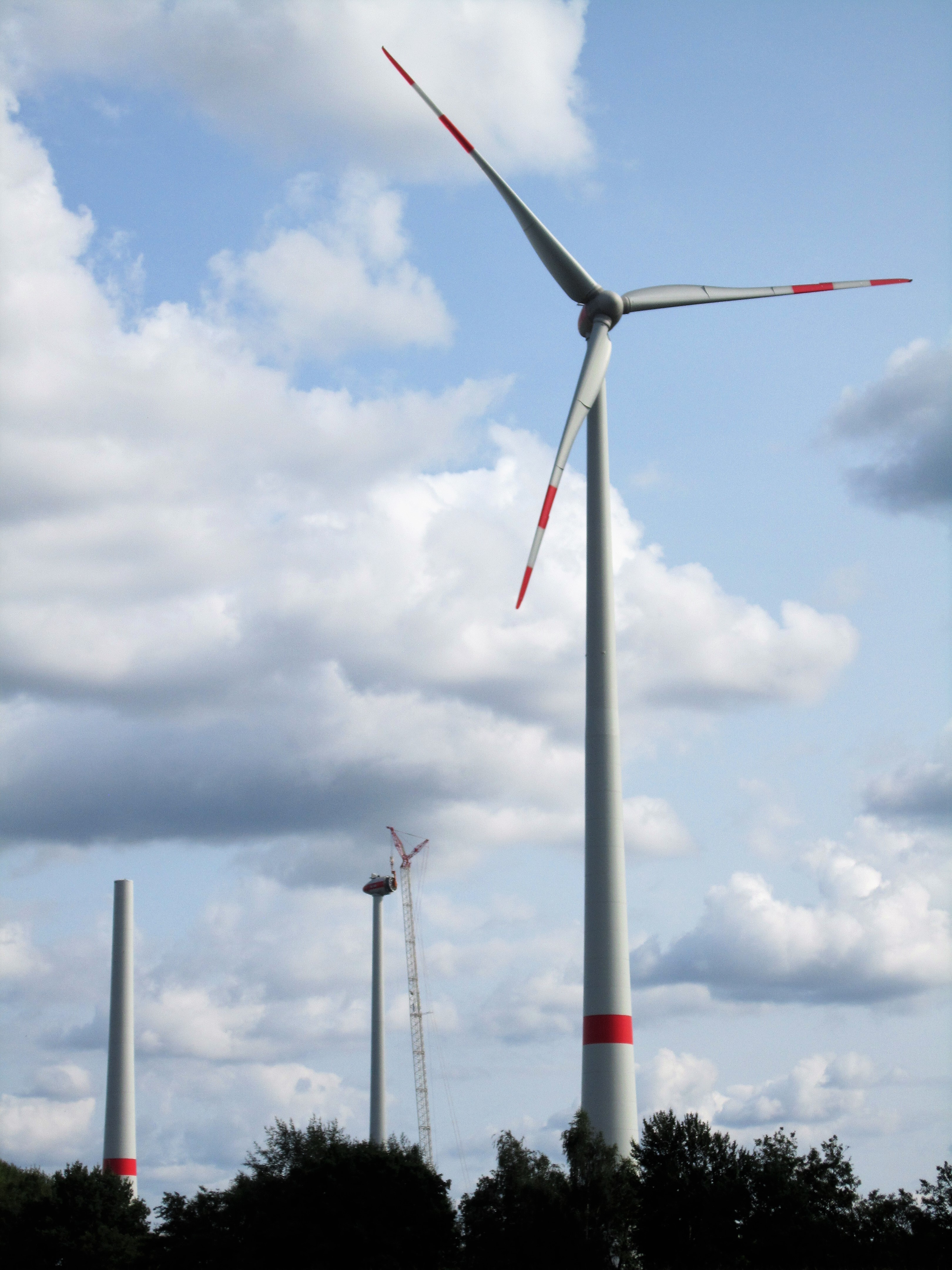 Windpark Krimpenfort (Lohne, Kreis Vechta, Niedersachsen). Drei verschiedene Bauphasen.